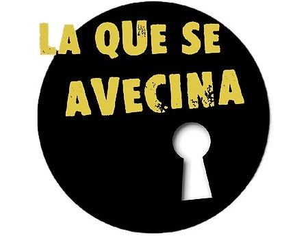 El logo editado de la serie de Mediaset La que se avecina